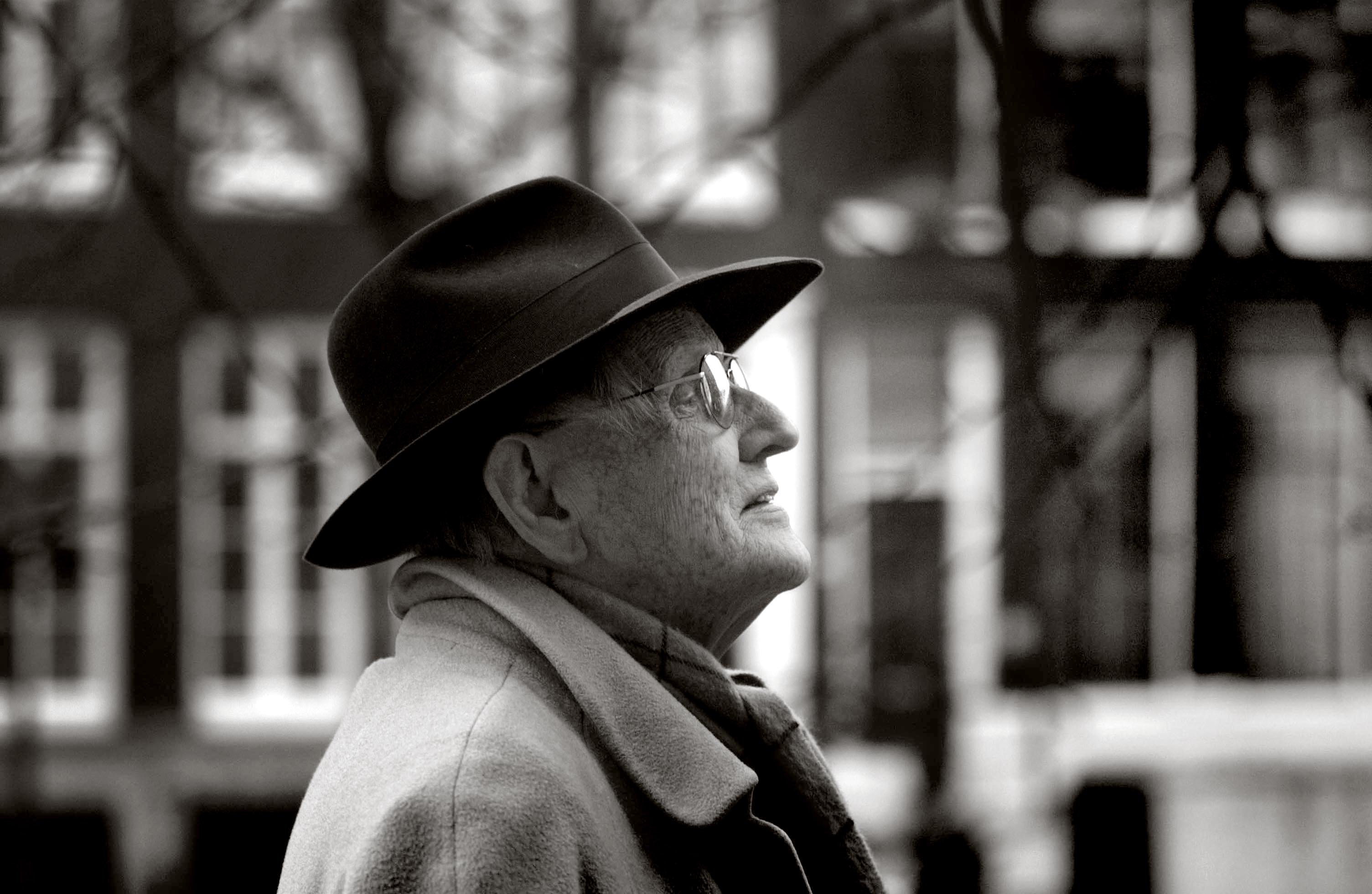 Cornelis Walterus Antonius (Kees) Fens (Amsterdam, 18 oktober 1929 – aldaar, 14 juni 2008), toonaangevende Nederlandse literatuurcriticus, essayist en letterkundige.